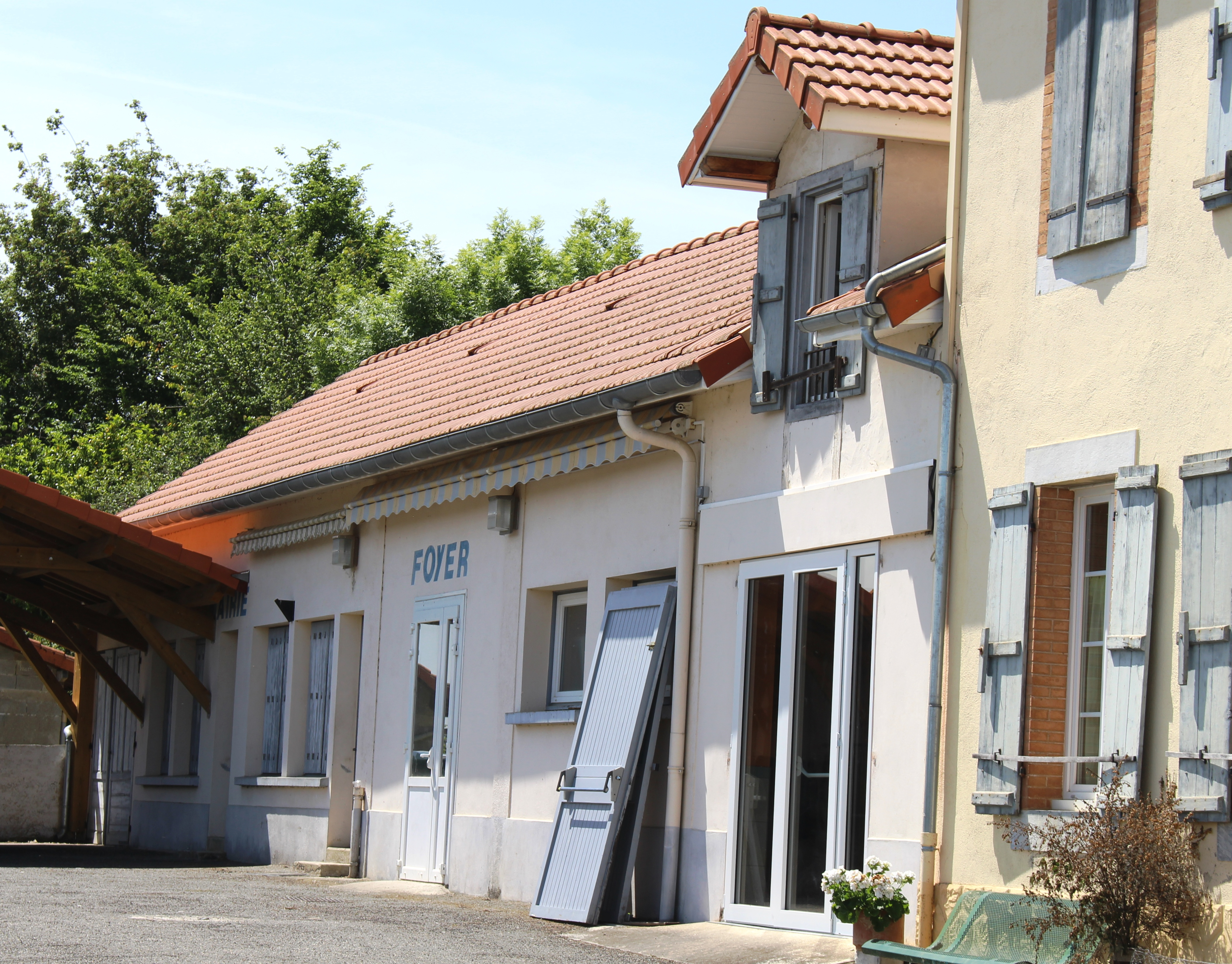 Foyer rural de Mansan (Hautes-Pyrénées)